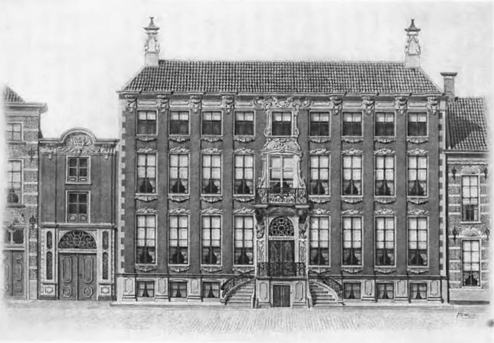 Het huis van Sichterman, Ossemarkt, Groningen